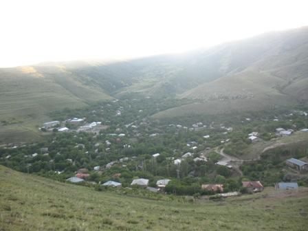 ՀՀ Կոտայքի մարզի Արզական գյուղի համայնապատկերը